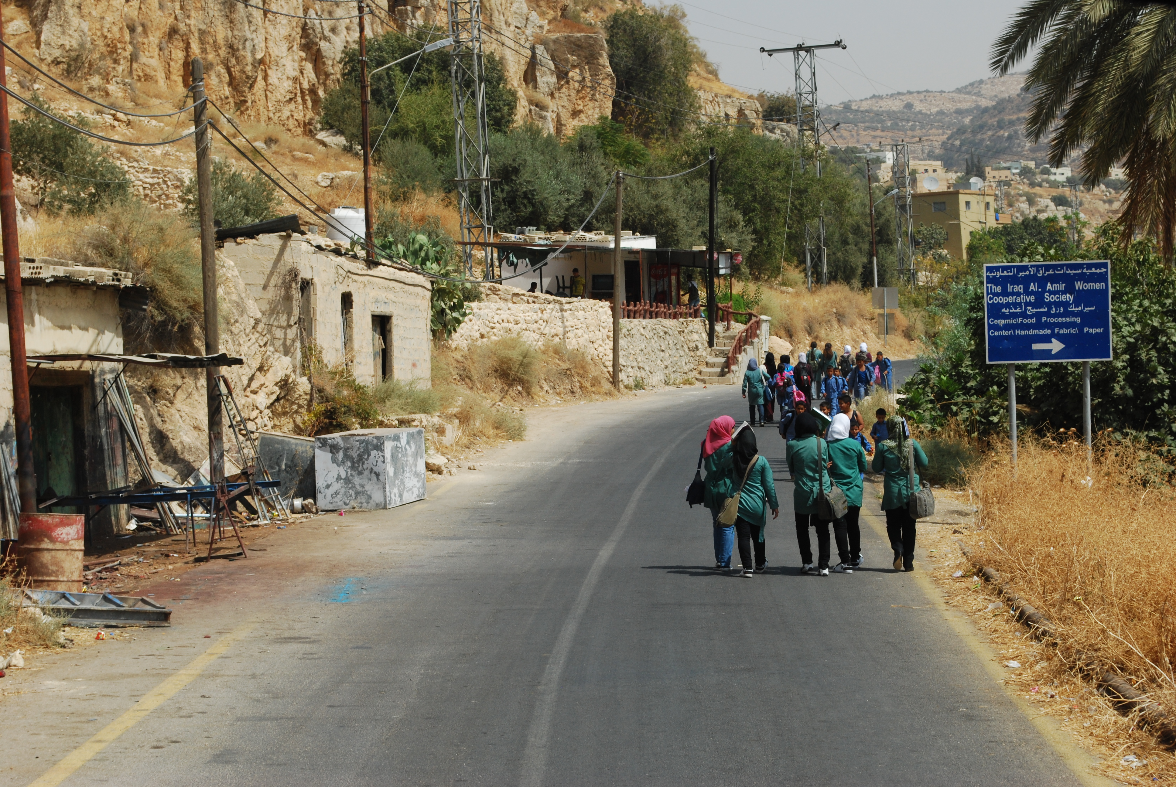 Iraq al Amir : enfants sur le chemin de l'école.